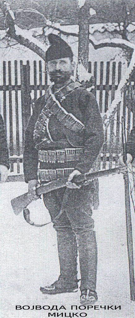 Мицко Крстевски, македонски ајдутин, учесник во Руско-турската војна, војвода во Демихисарскиот заговор, пропаганден агитатор и прв српски четнички војвода во Македонија.